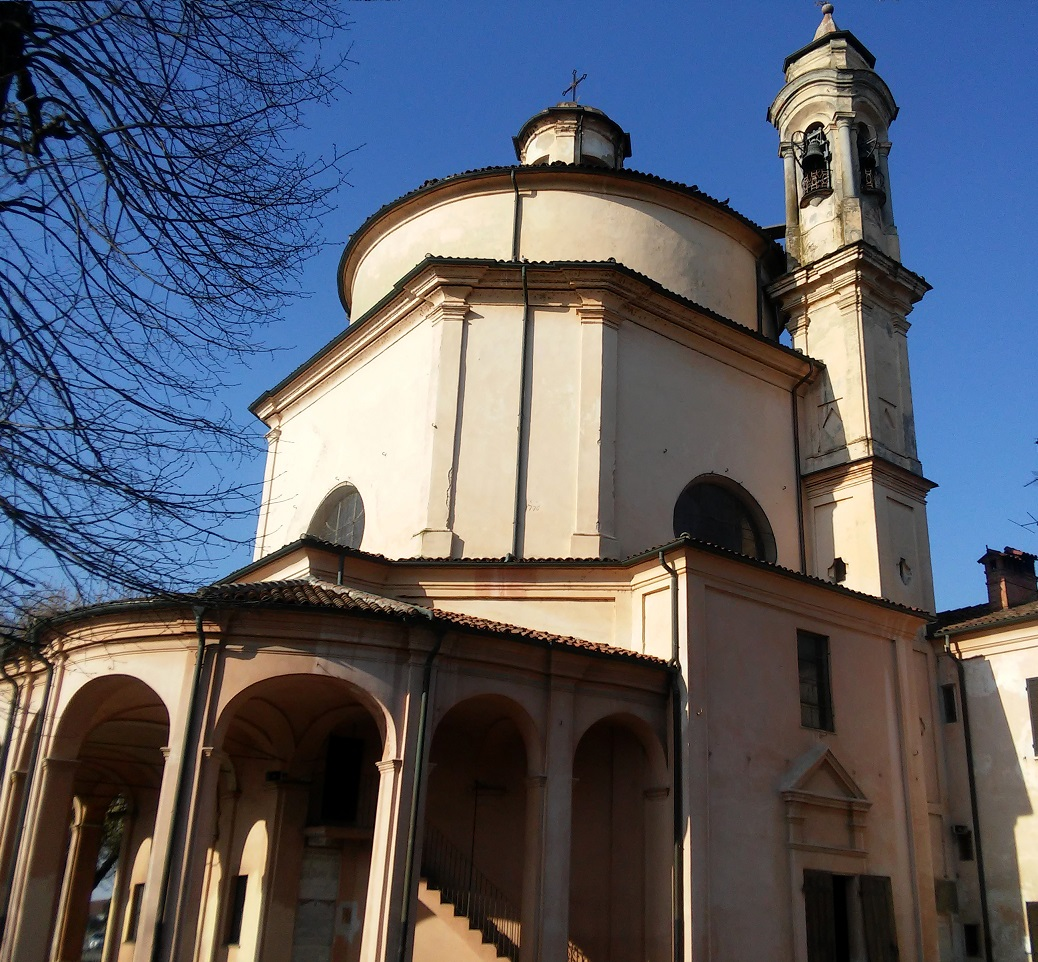 Walty1971